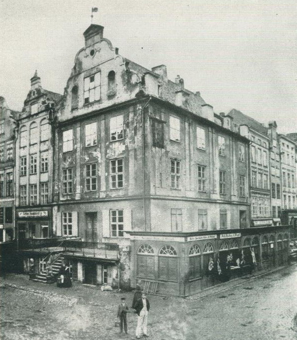 Dwór Artusa w Elblągu przed 1878 r.